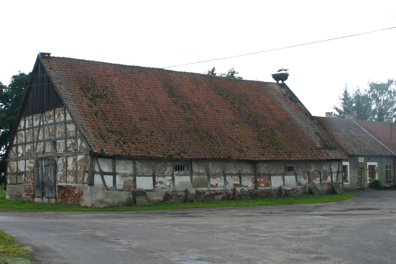 Sątoczno (niem. Leunenburg) – wieś w Polsce położona w województwie warmińsko-mazurskim, w powiecie kętrzyńskim, w gminie Korsze.